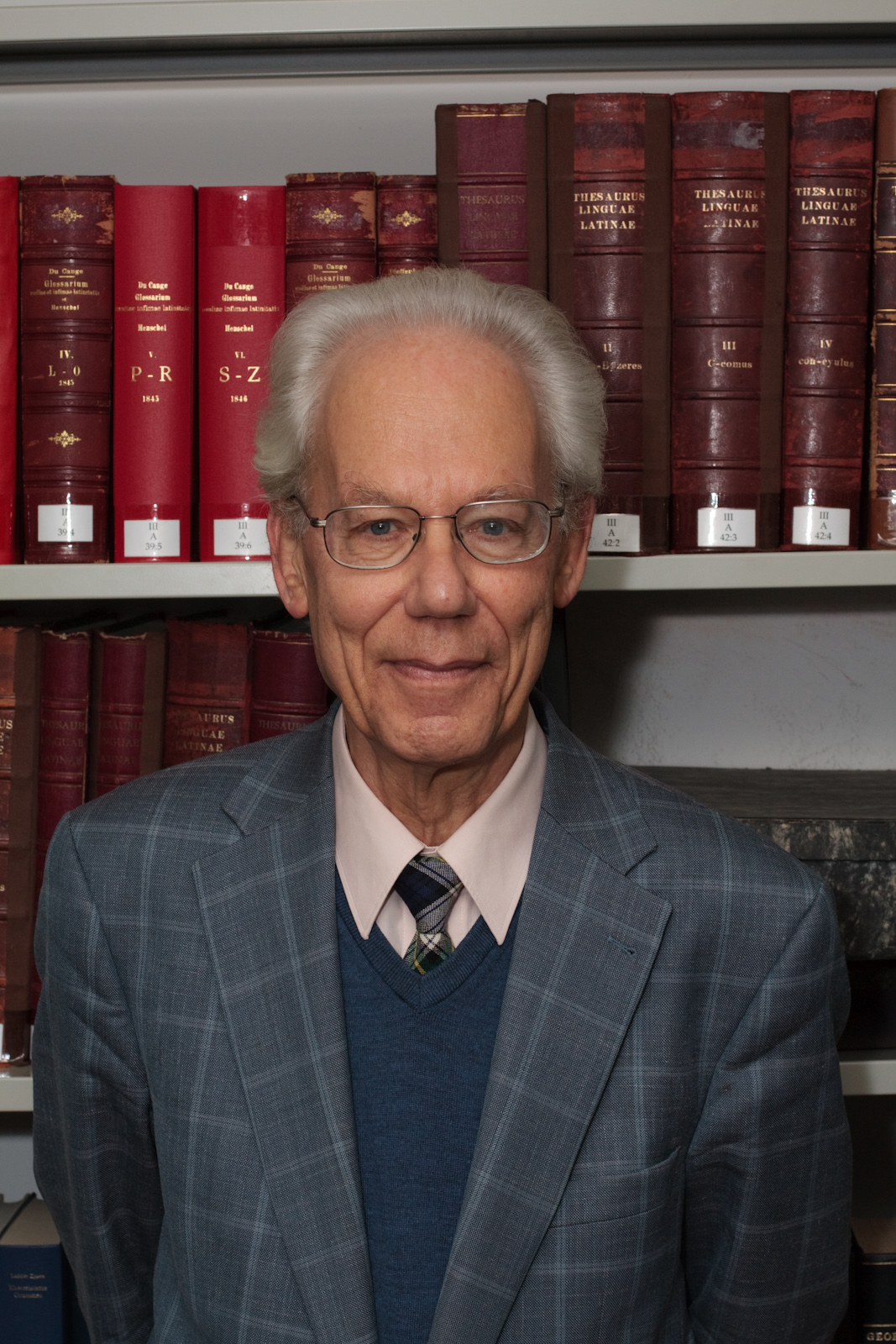 Der Altphilologe Rolf Heine in der Bibliothek des Göttinger Seminars für Klassische Philologie. Im Hintergrund der Thesaurus Linguae Latinae.